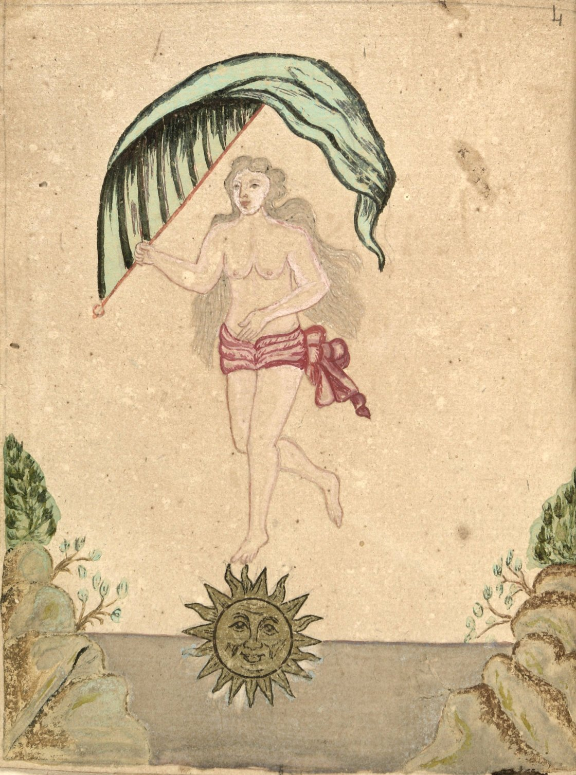 Immagine del manoscritto Zoroaster Clavis Artis, Ms-2-27, Biblioteca Civica Hortis, Trieste, vol. 1, pag. 4